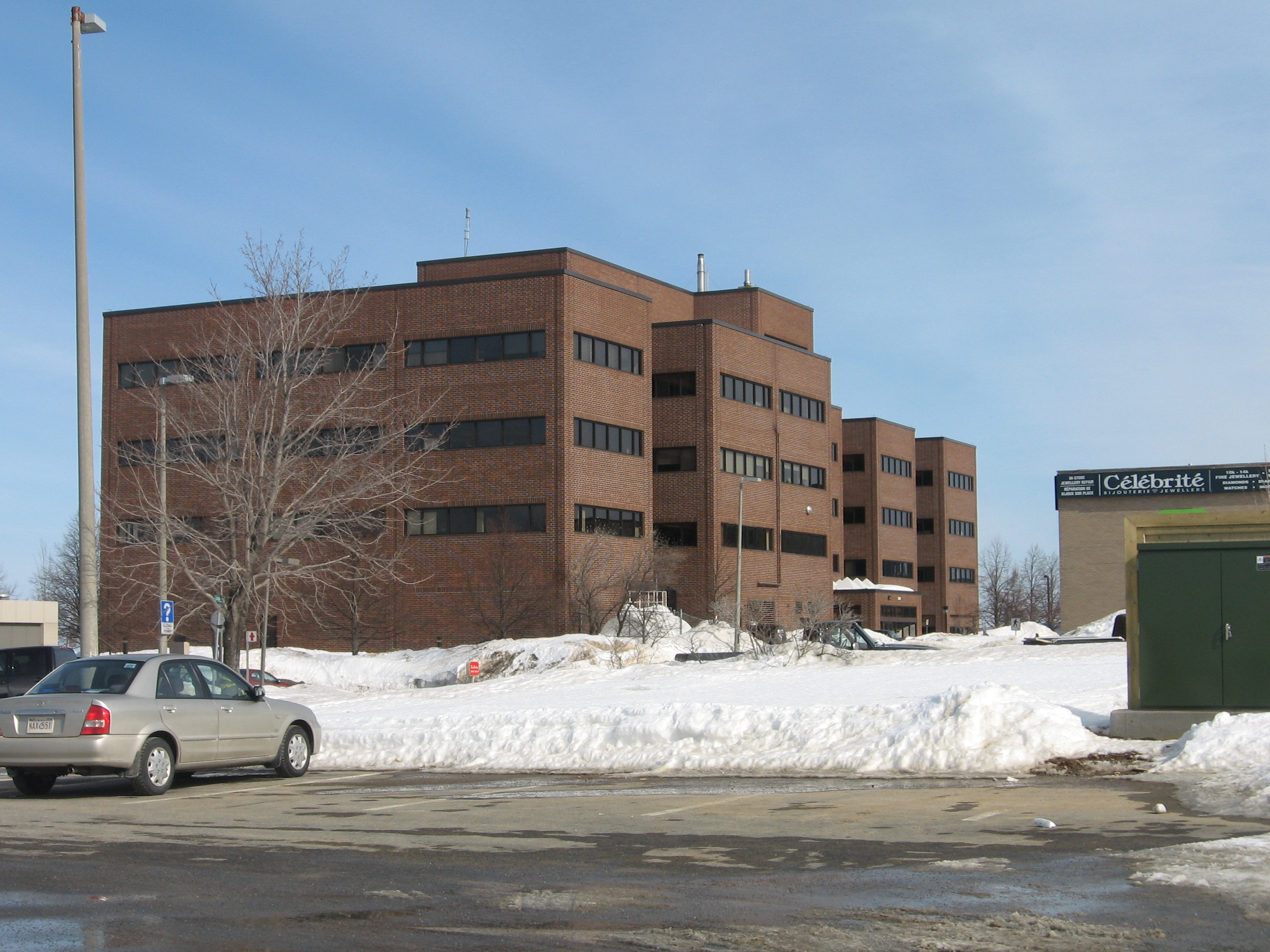 Édifice Nicholas-Denys (gouvernement du Canada)